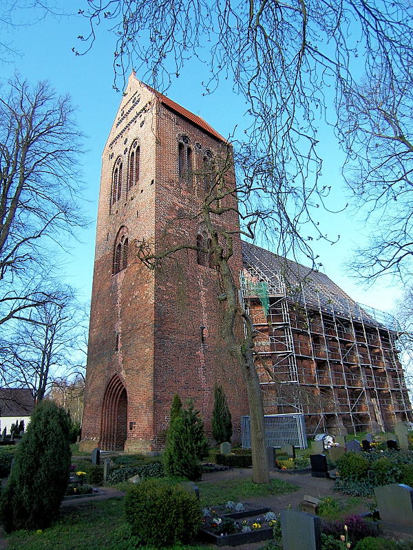 Kirche in Zurow, Landkreis Nordwestmecklenburg